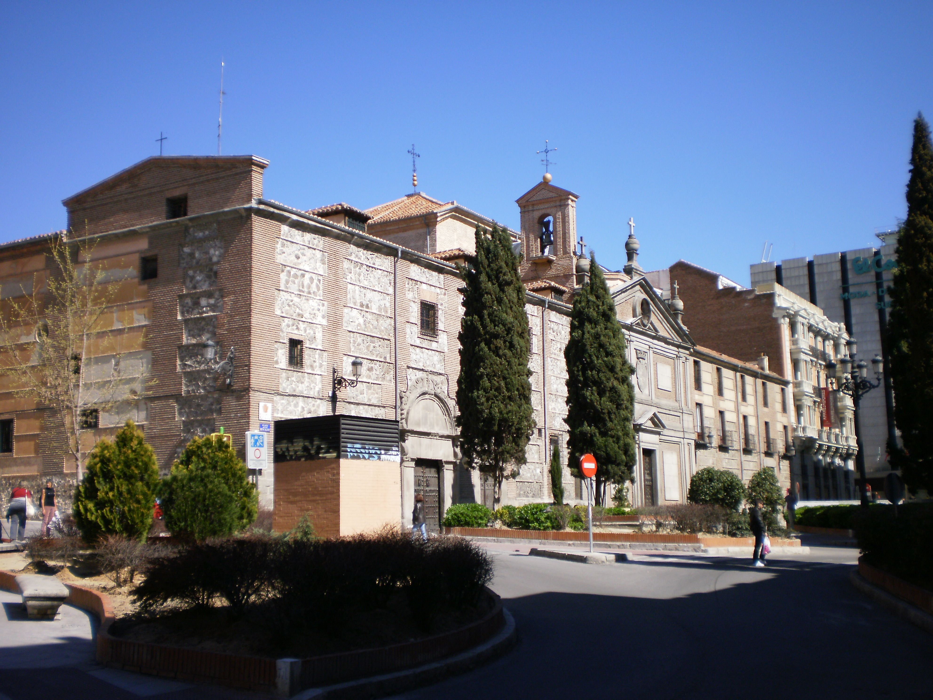 Convent of Las Descalzas Reales, Madrid